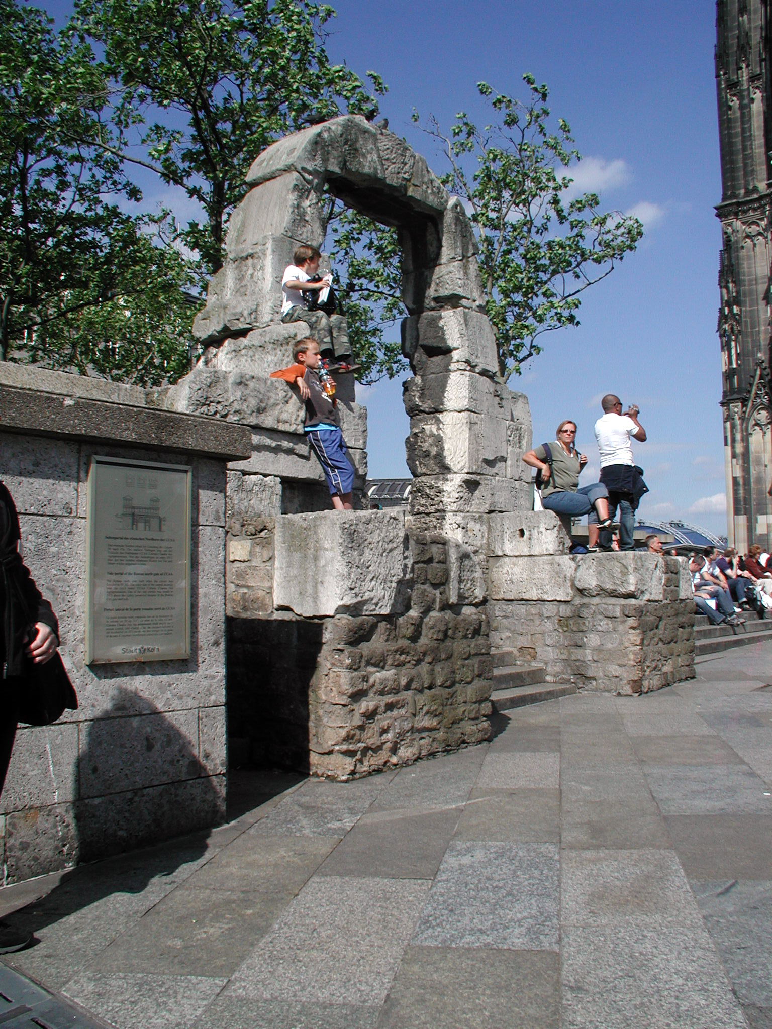 Hohe-Straße, Köln, Fußgänger-Seitenpforte des römischen Nordtors